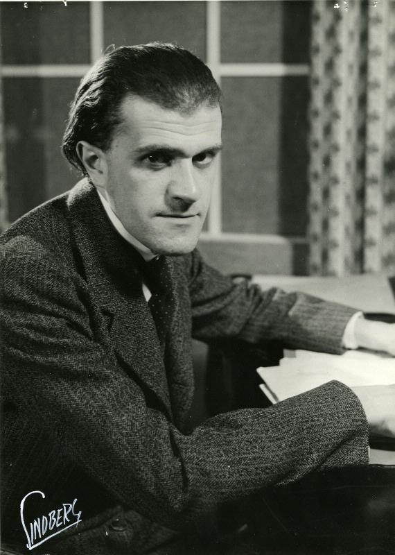 Skådespelaren Sture Ericson. Scenbild ur "Påsk", Helsingborgs stadsteater 1947/48.